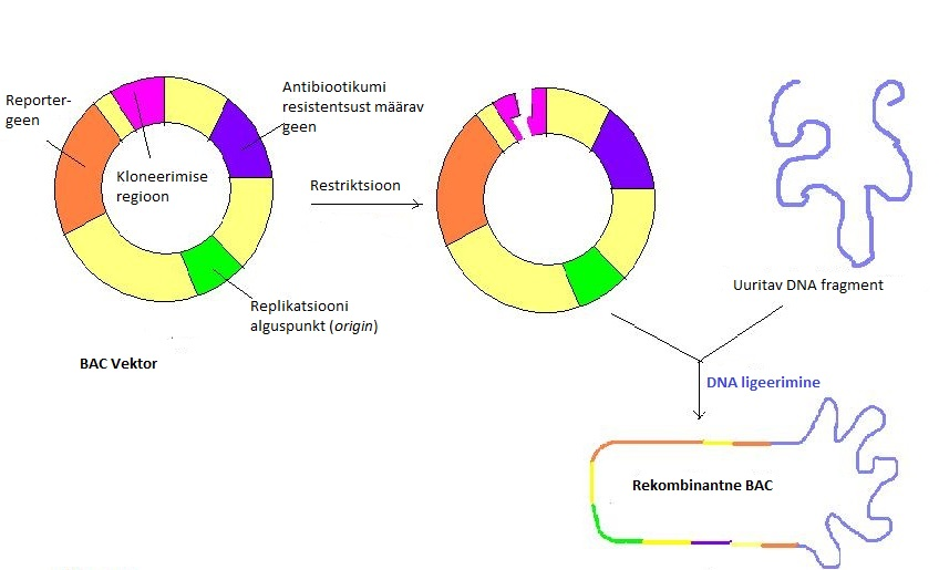 Bac Vektor eesti keeles